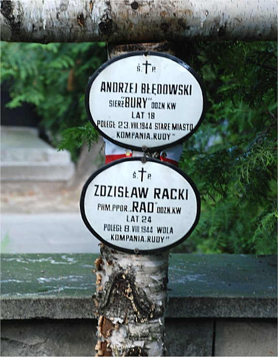 Grób na Powązkach Wojskowych